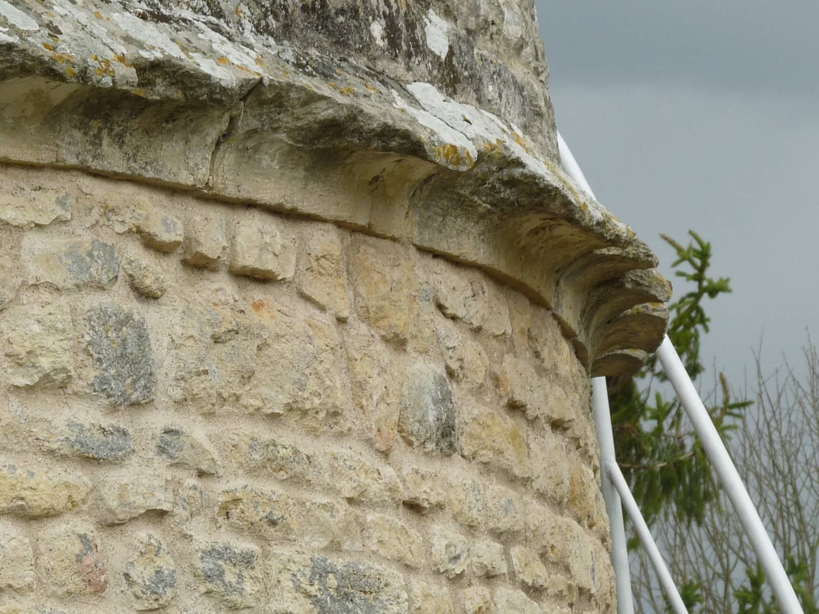 Corniche de défense, dite randière ou larmier sur le pigeonnier du château de Neuvicq-le-Château, Charente-Maritime, France